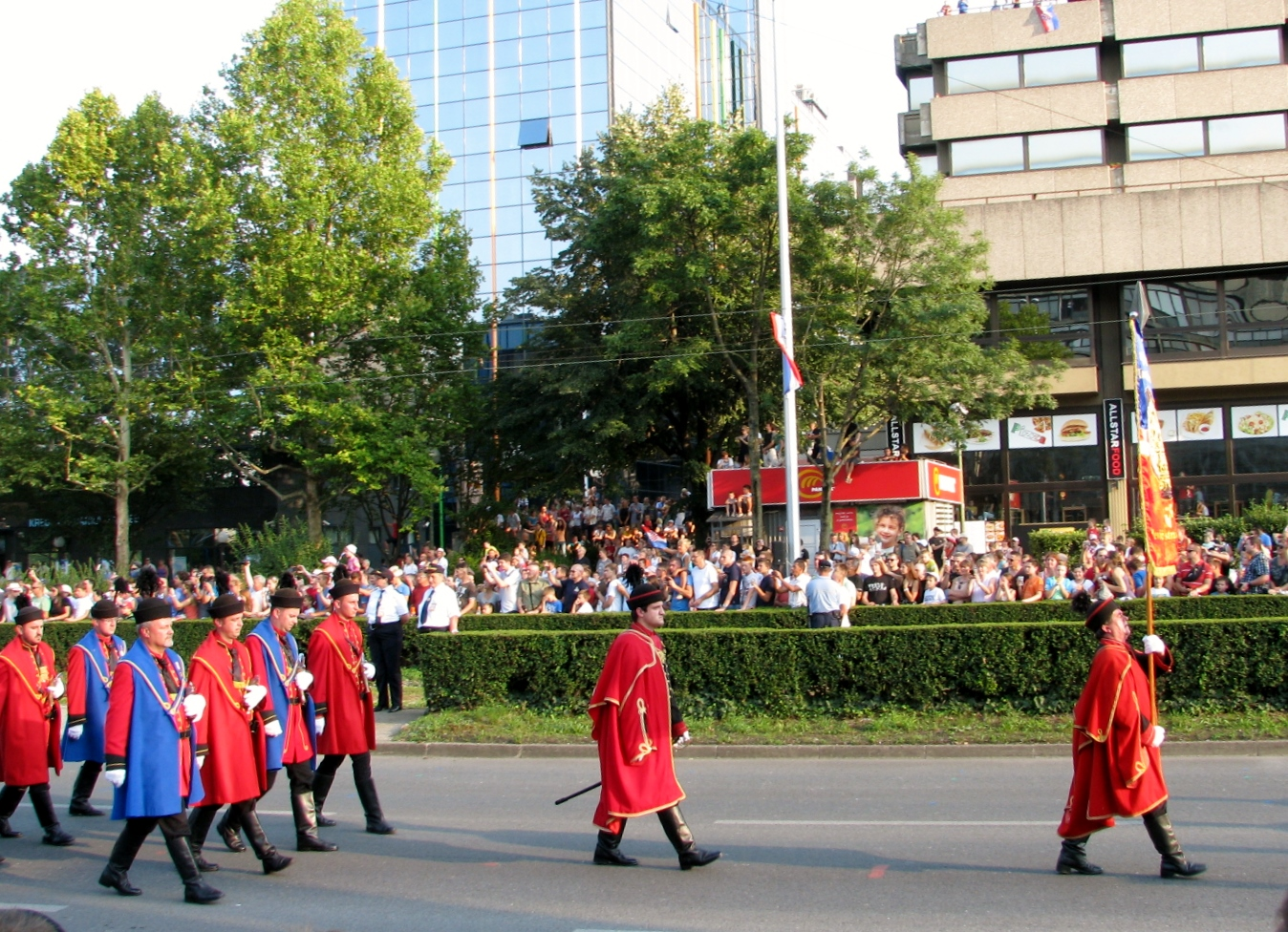 Keglevićeva straža Kostel na svečanom mimohodu u Zagrebu, 4. kolovoza 2015.